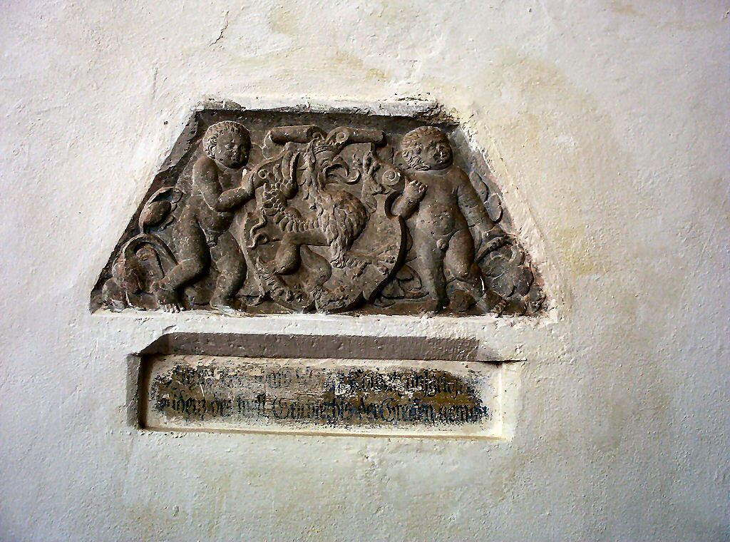 Kołbacz - płaskorzeźba w ścianie prezbiterium